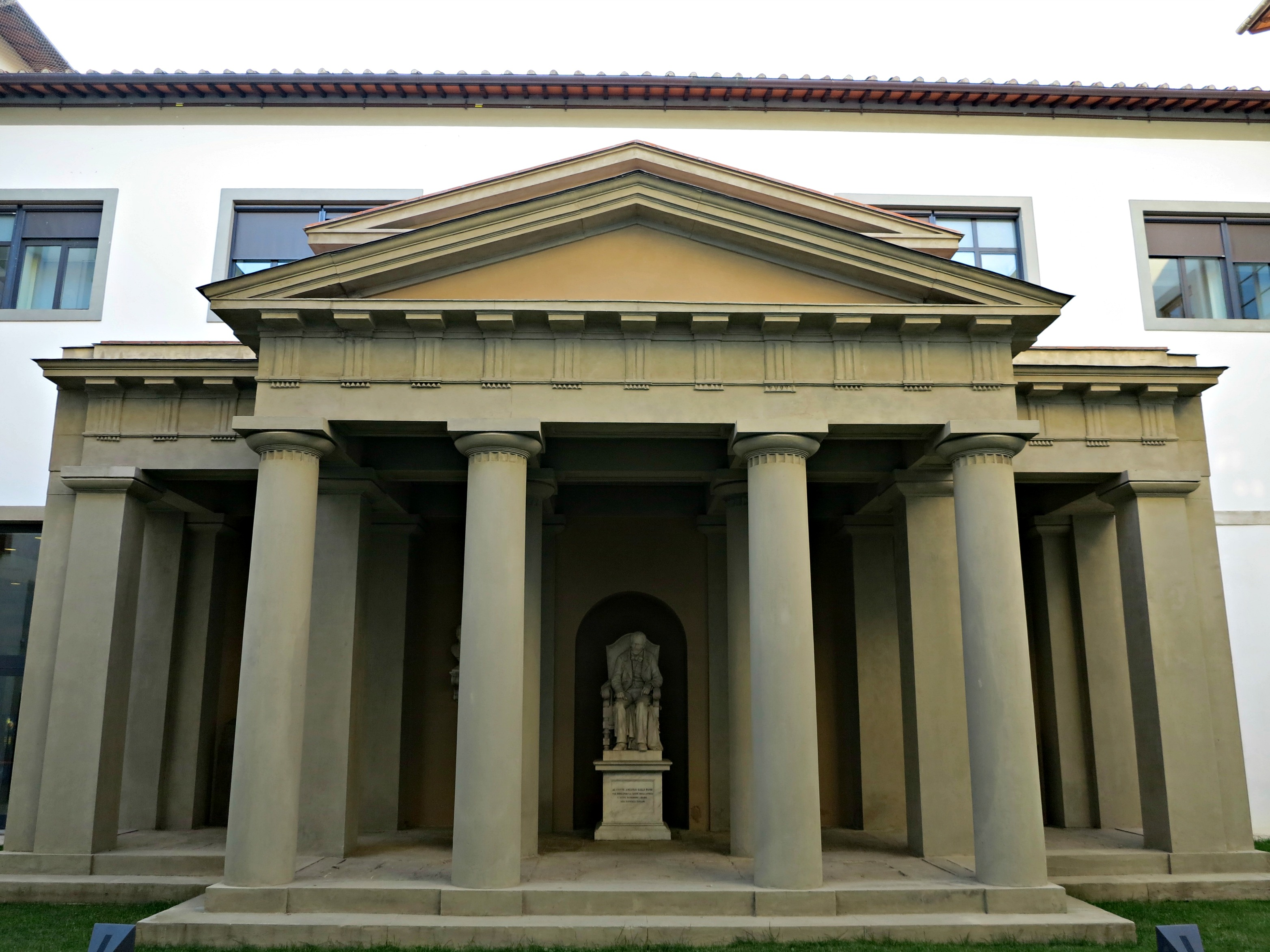 Chiostro delle Ossa (2)